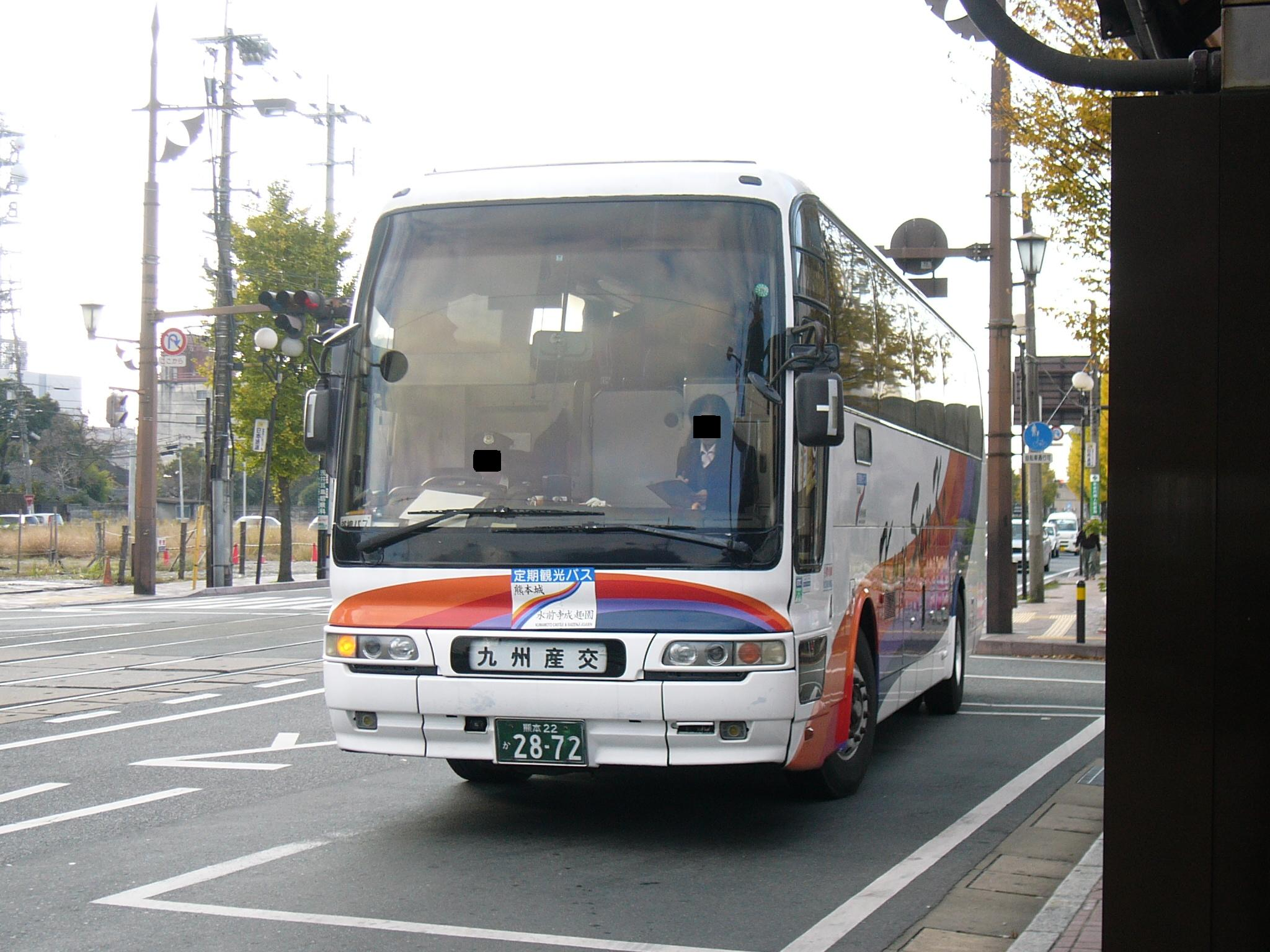 事業者：九州産交バス 用途：高速路線 （撮影時は熊本市内の定期観光バスとして使用） 登録番号：熊本22 か 2872 車種：三菱ふそう 撮影場所：熊本駅前にて